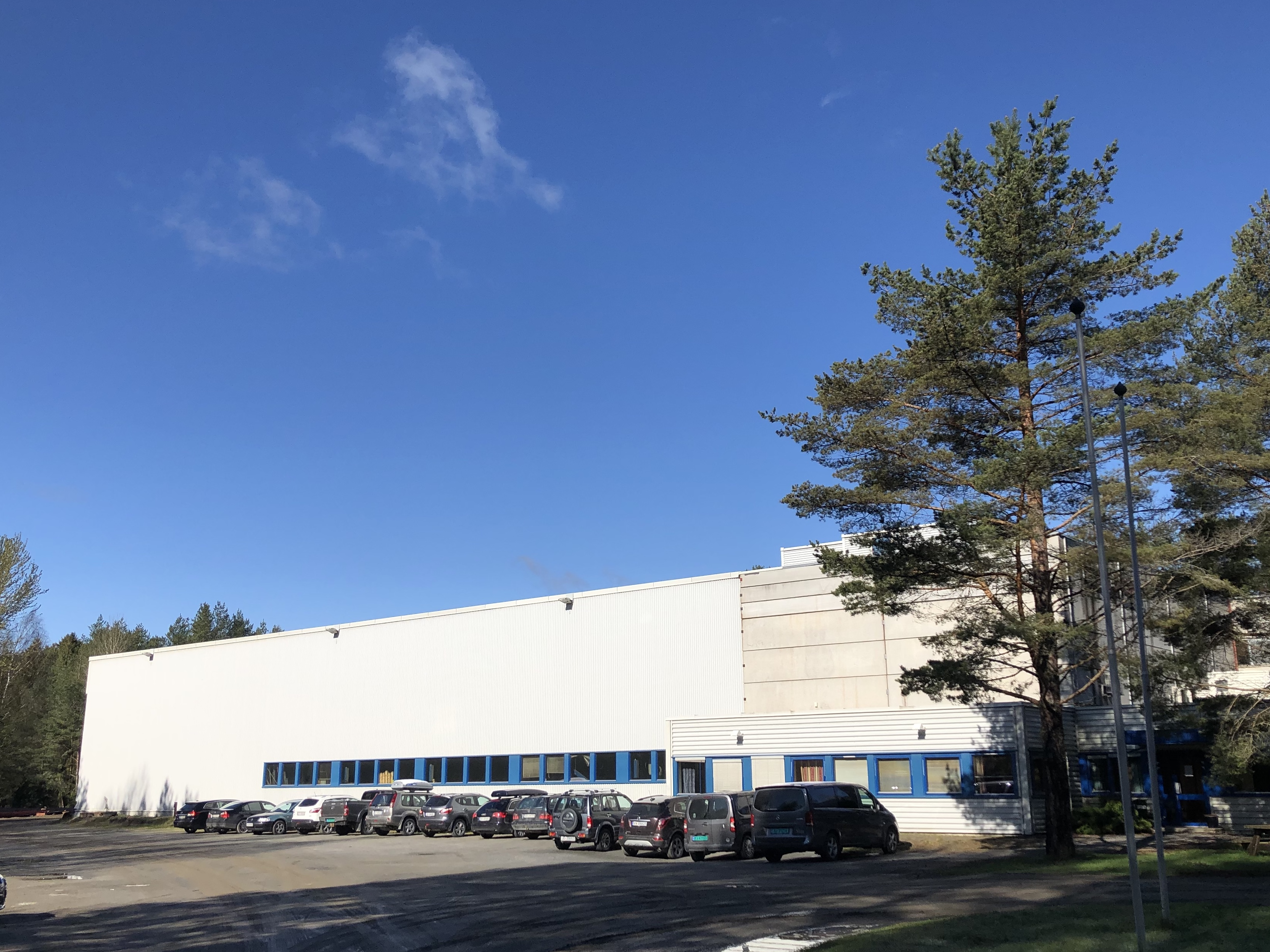 Næsset Mek.Verksted, Bjønnputtvegen 3, Jevnaker